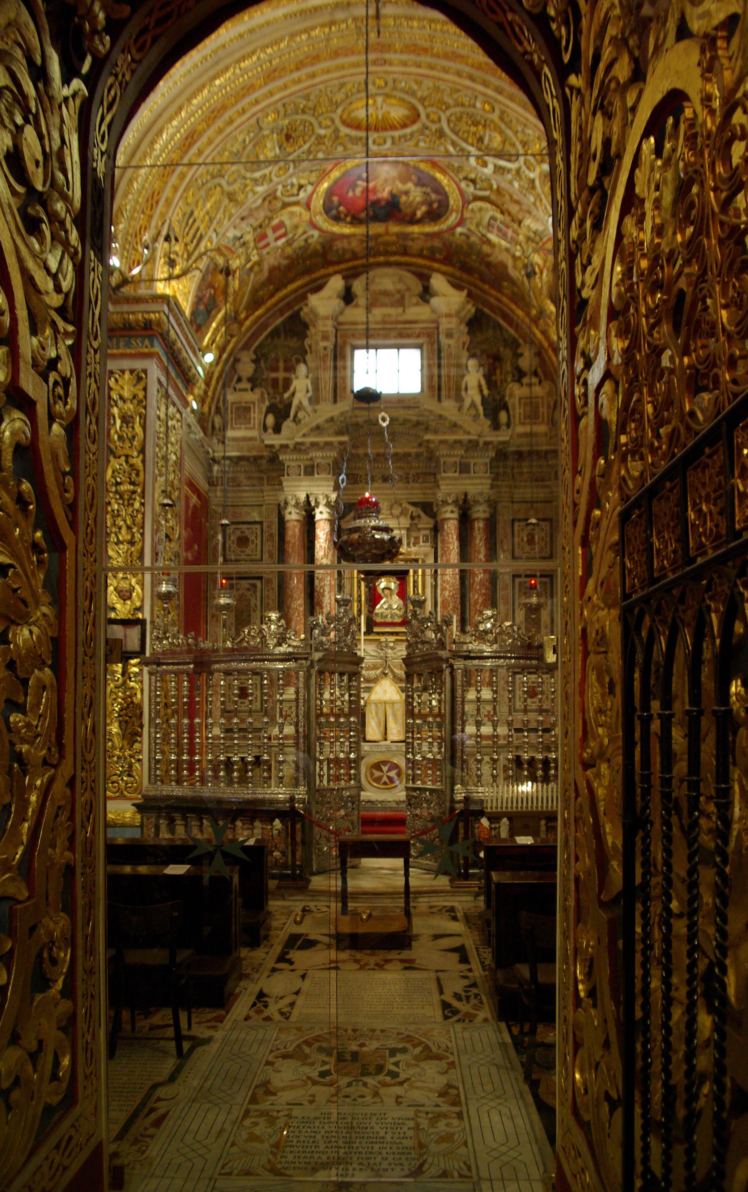 Malta Valletta, St. Johannes Konkathedrale